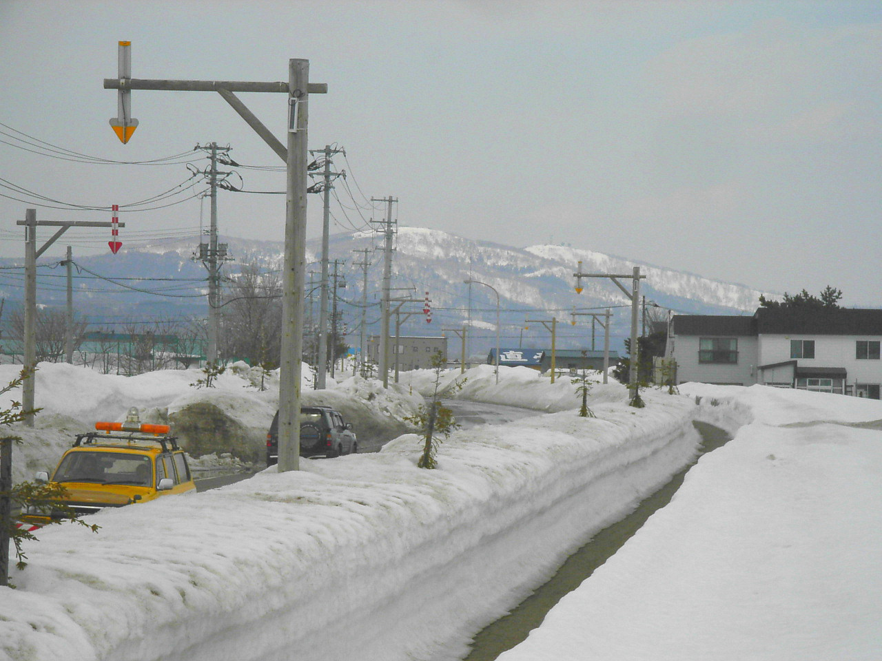 Hokkaido Prefectural Road 28 Tobetsu Hamamasuko Line. Tobetsu, Hokkaido, Japan.